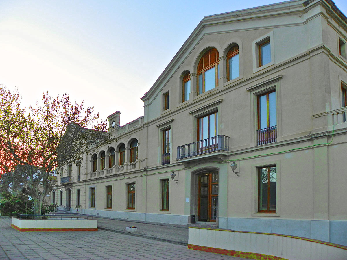 Escola de gèneres de punt de Canet de Mar (Maresme).